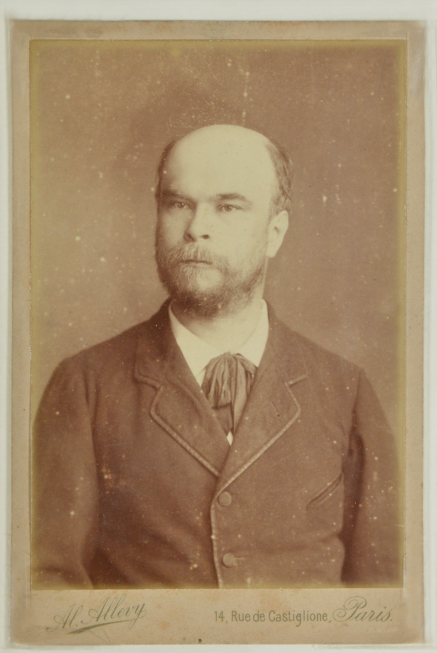 Paul Verlaine photographié par Alcide Allevy, 1883. Épreuve sur papier albuminé contrecollée sur carton au format carte-cabinet (14,5 x 9,5 cm).